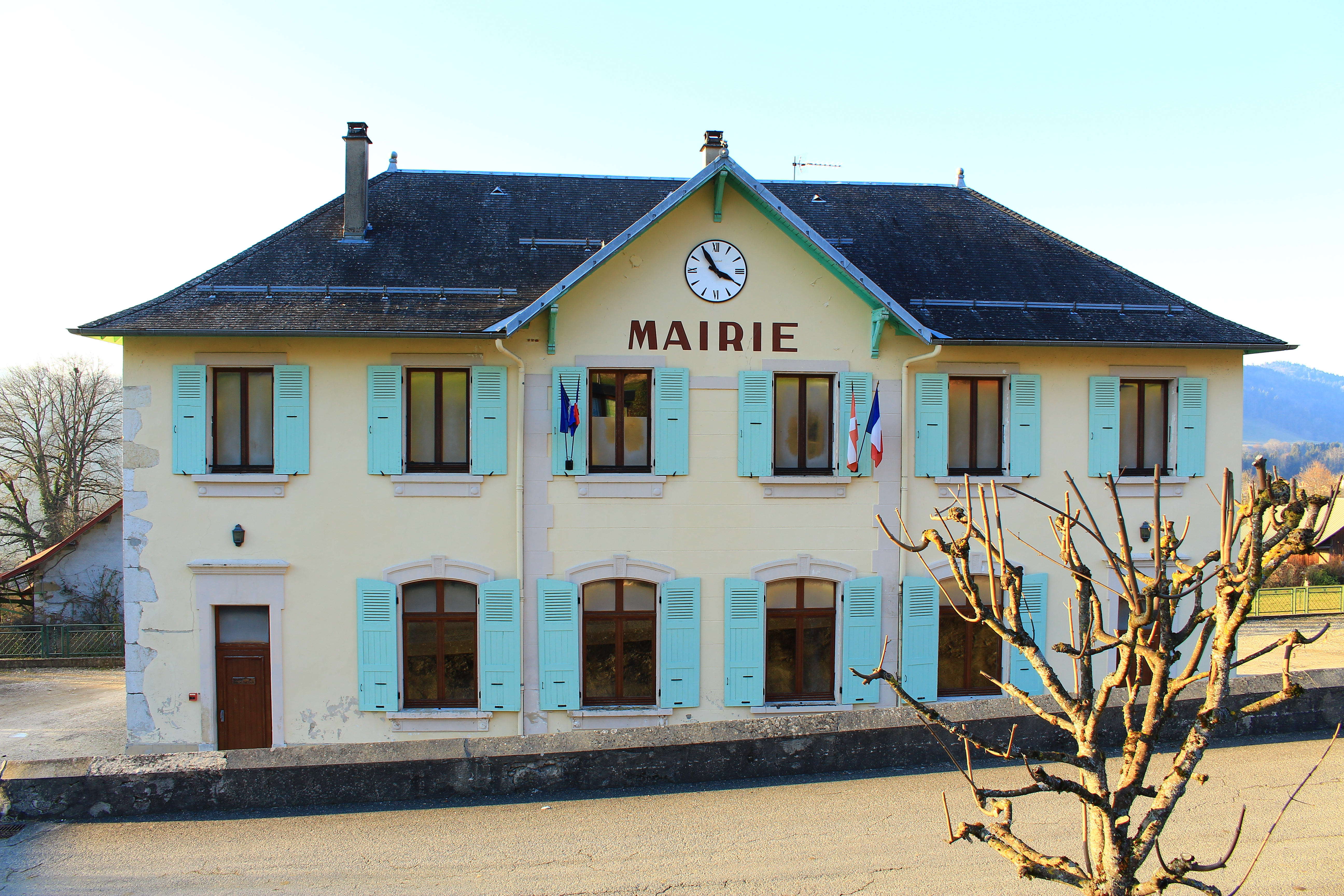 Mairie de La Bauche (Savoie) Décembre 2016